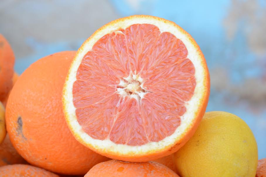 אשכולית אדומה